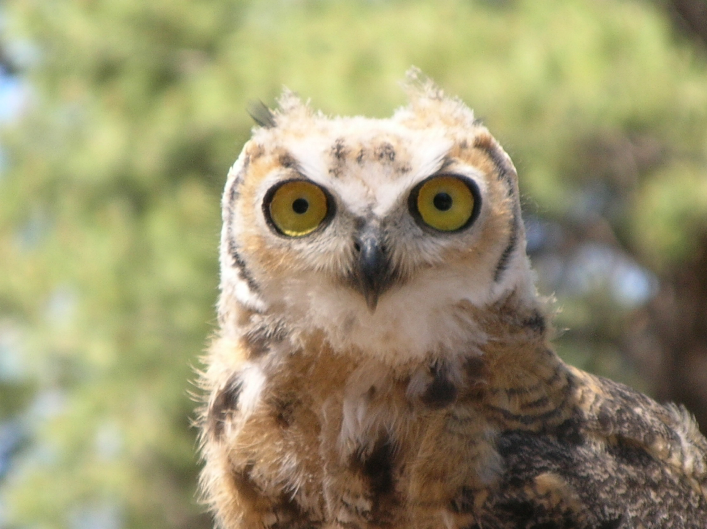 owlDSCN0260